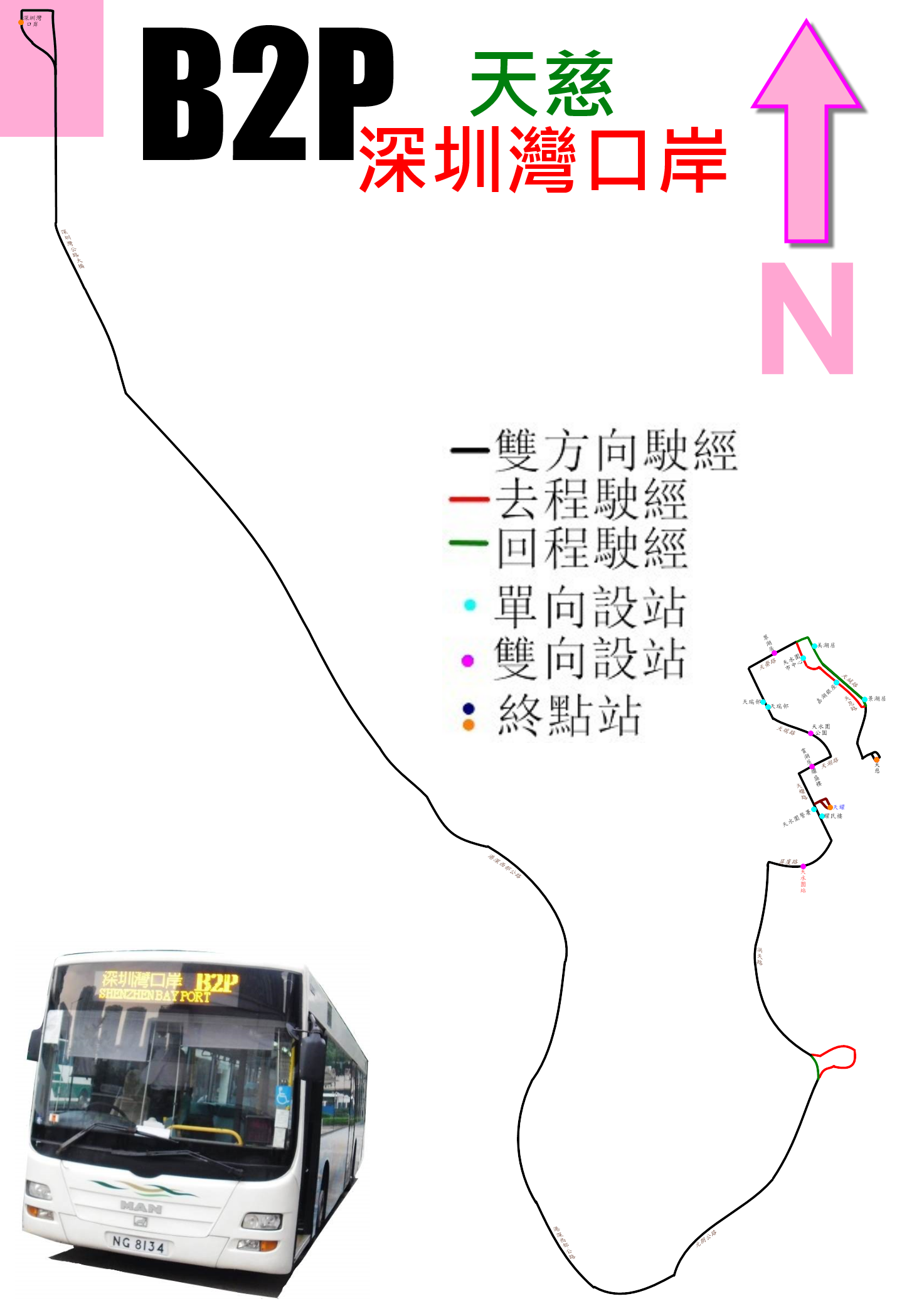 中文（香港）: 新大嶼山巴士B2P線的走線圖